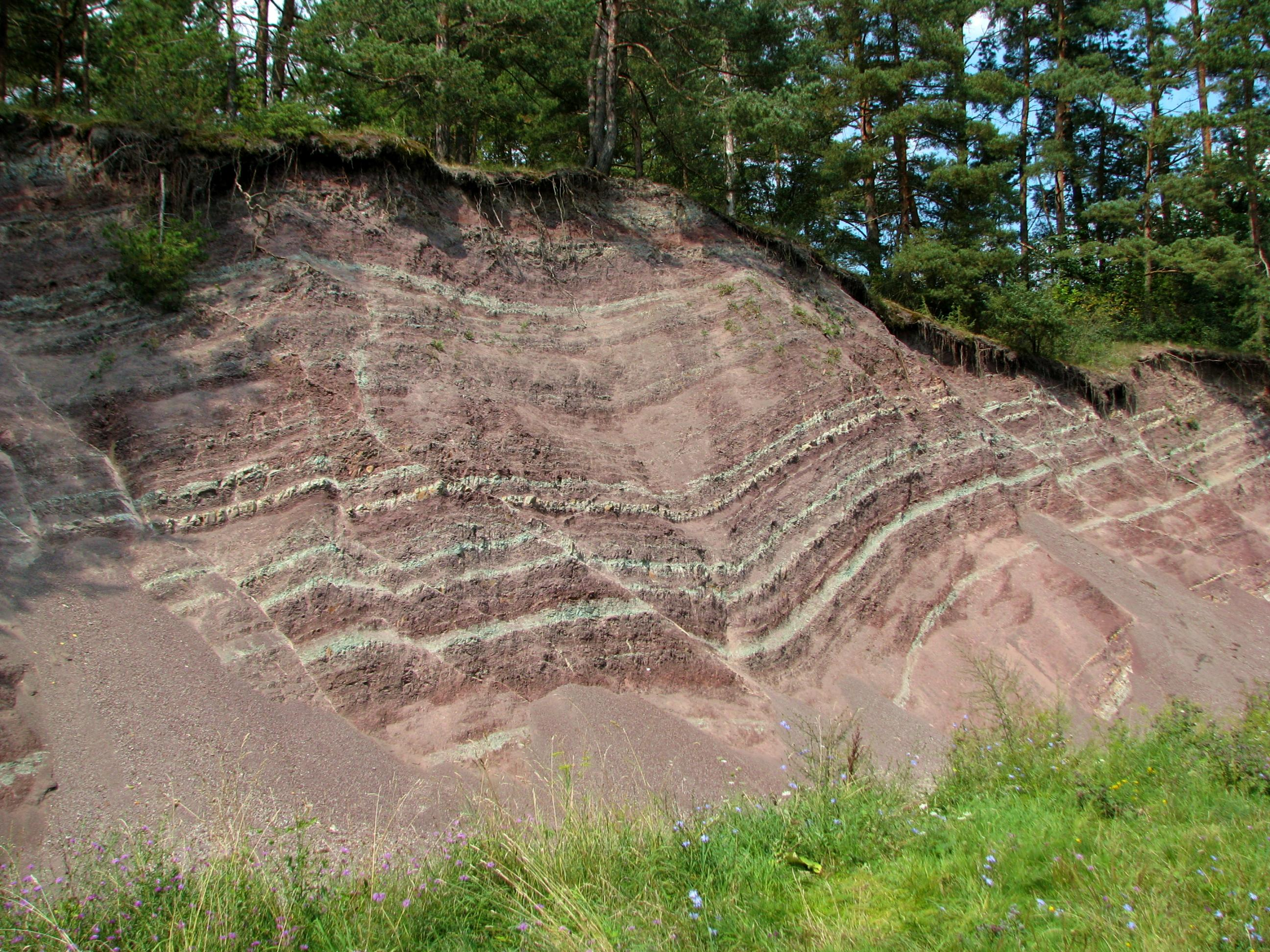 Aufschluss der Dolomitmergelkeuper-Folge südwestlich von Ütteroda.